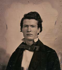 Mark Twain